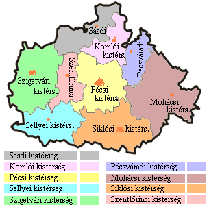 Baranya megye kistérségei